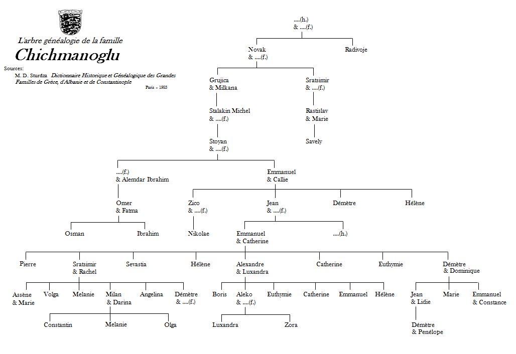 L'arbre généalogie de la famille Chichmanoglu